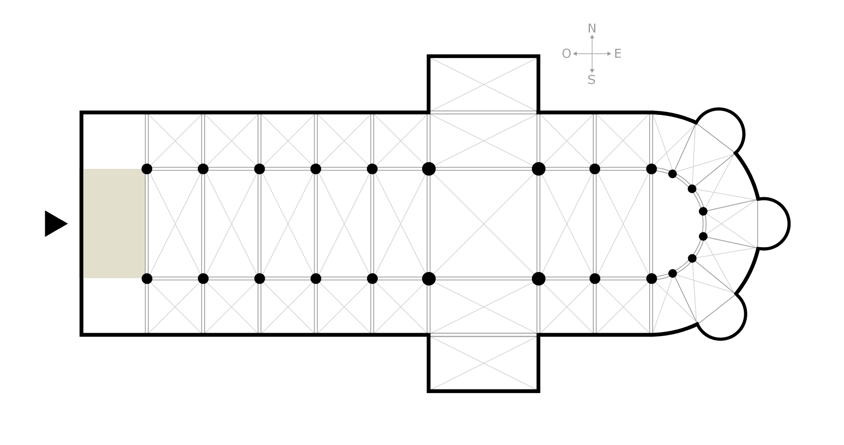 De afbeelding is bewerkt omdat het woord "oksaal" in alle andere talen een andere betekenis heeft (zie: "doksaal")